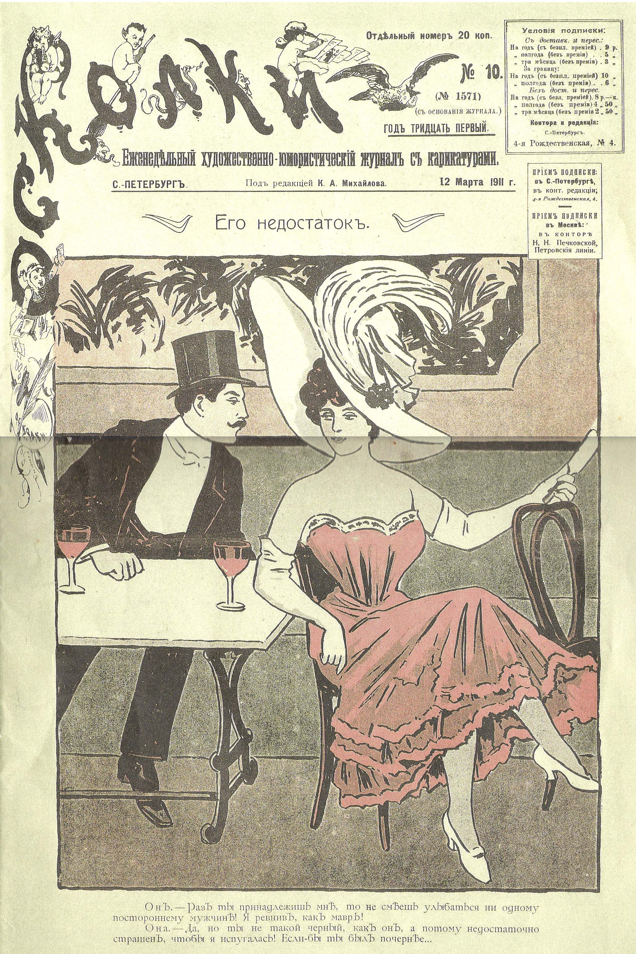 Обложка журнала "Осколки"